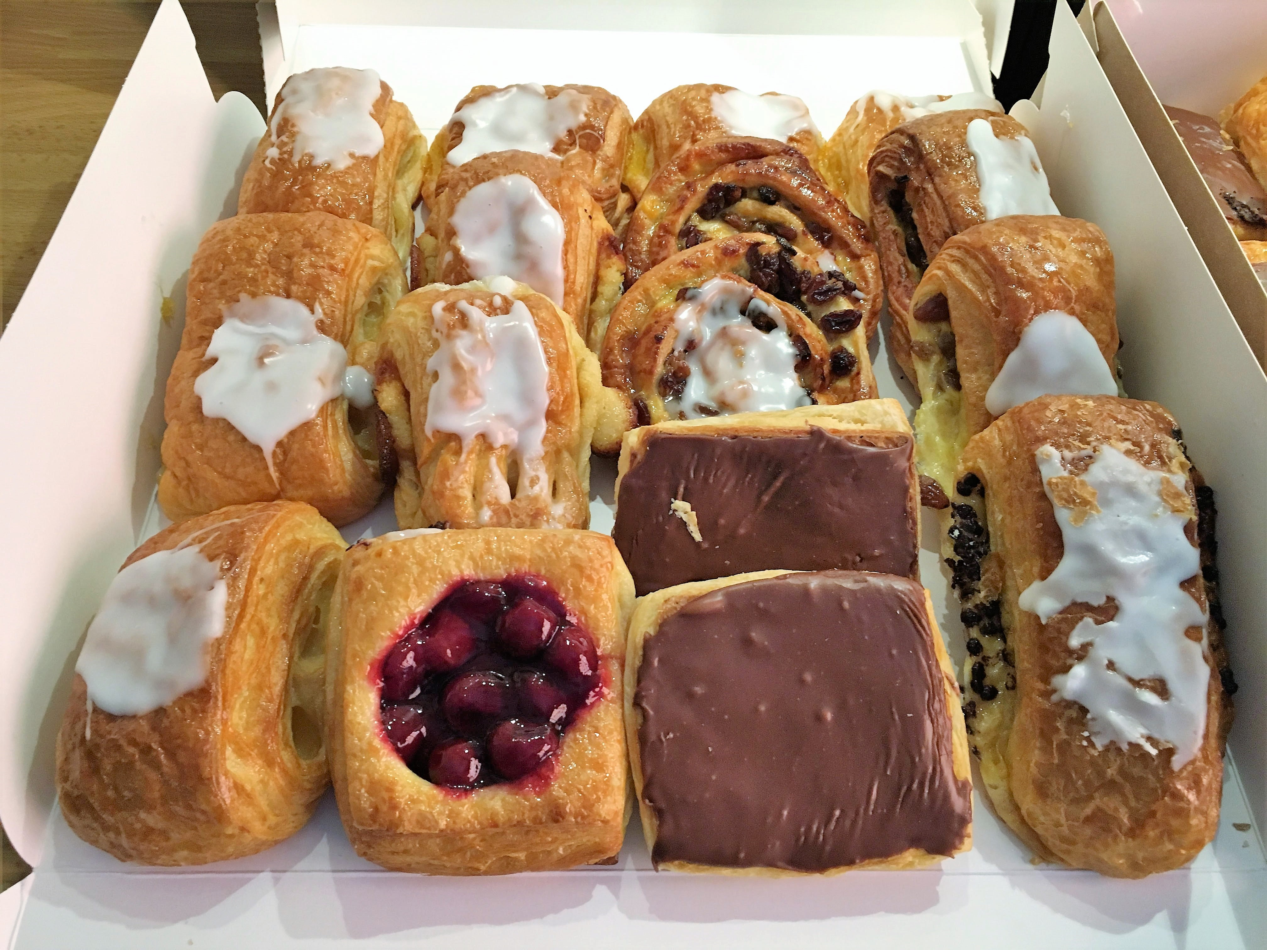 Viennoiseries